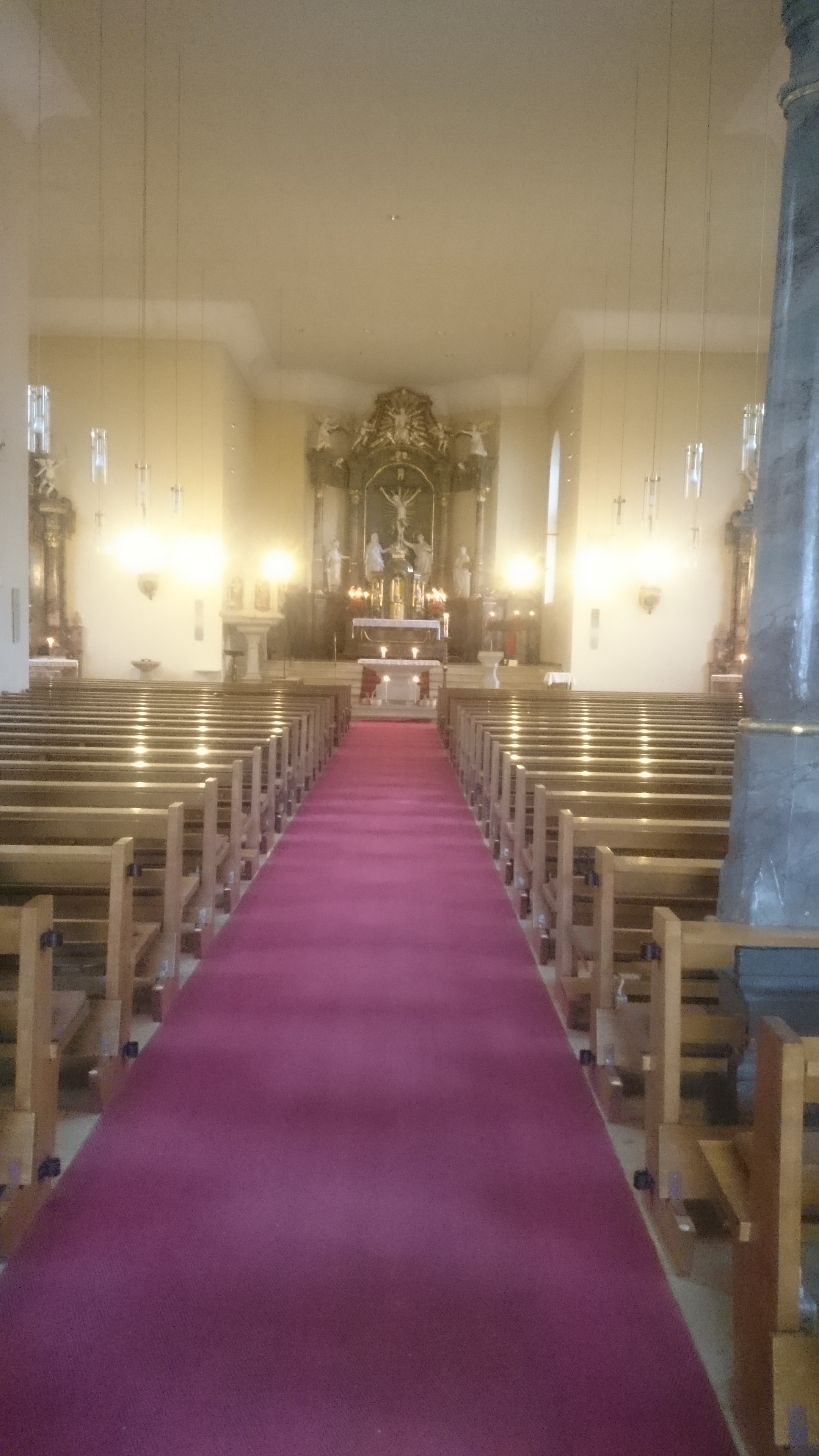 Die St.-Martins-Kirche in Oberlauda, einem Stadtteil von Lauda-Königshofen im Main-Tauber-Kreis.